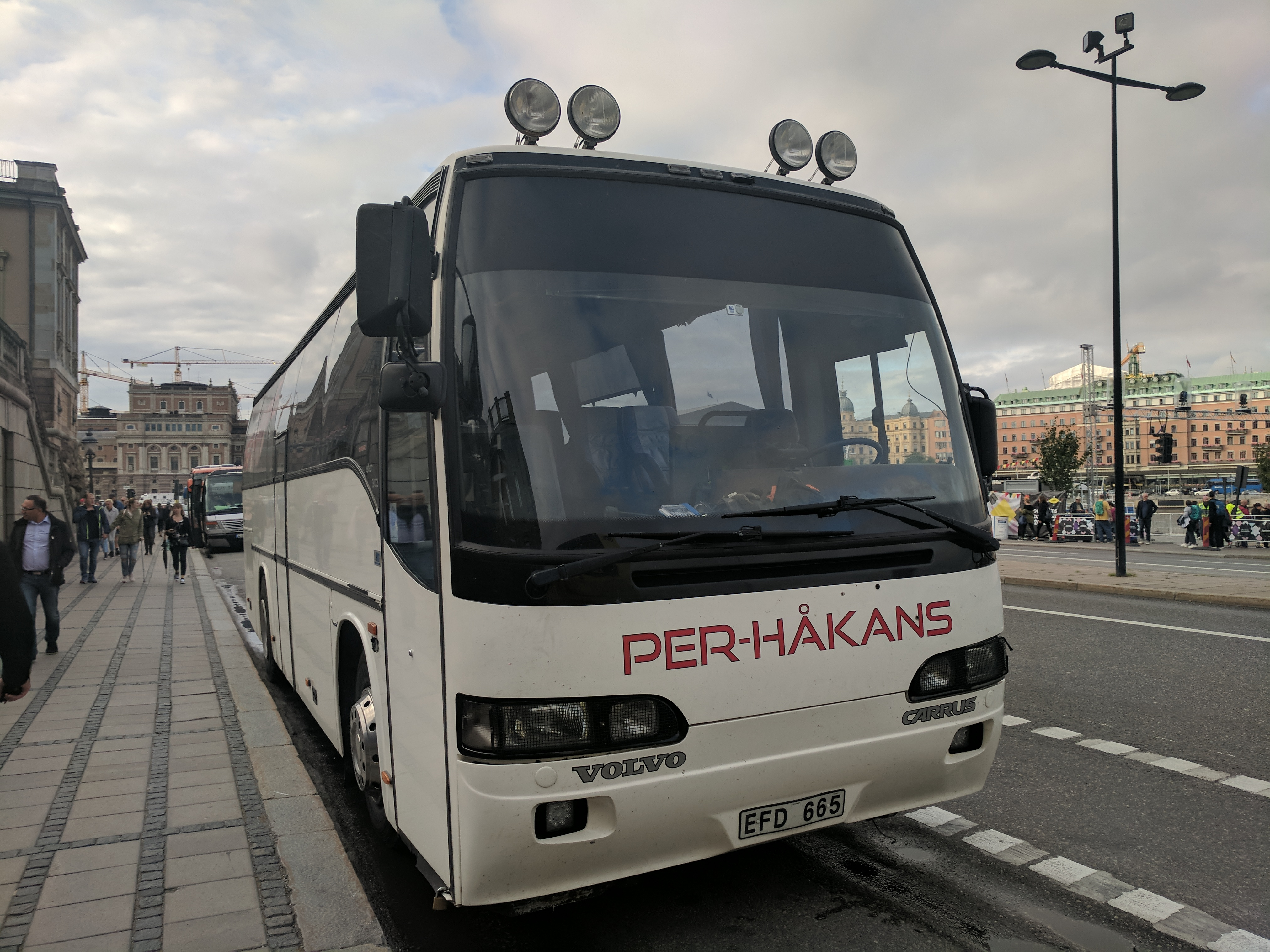 Per Håkans